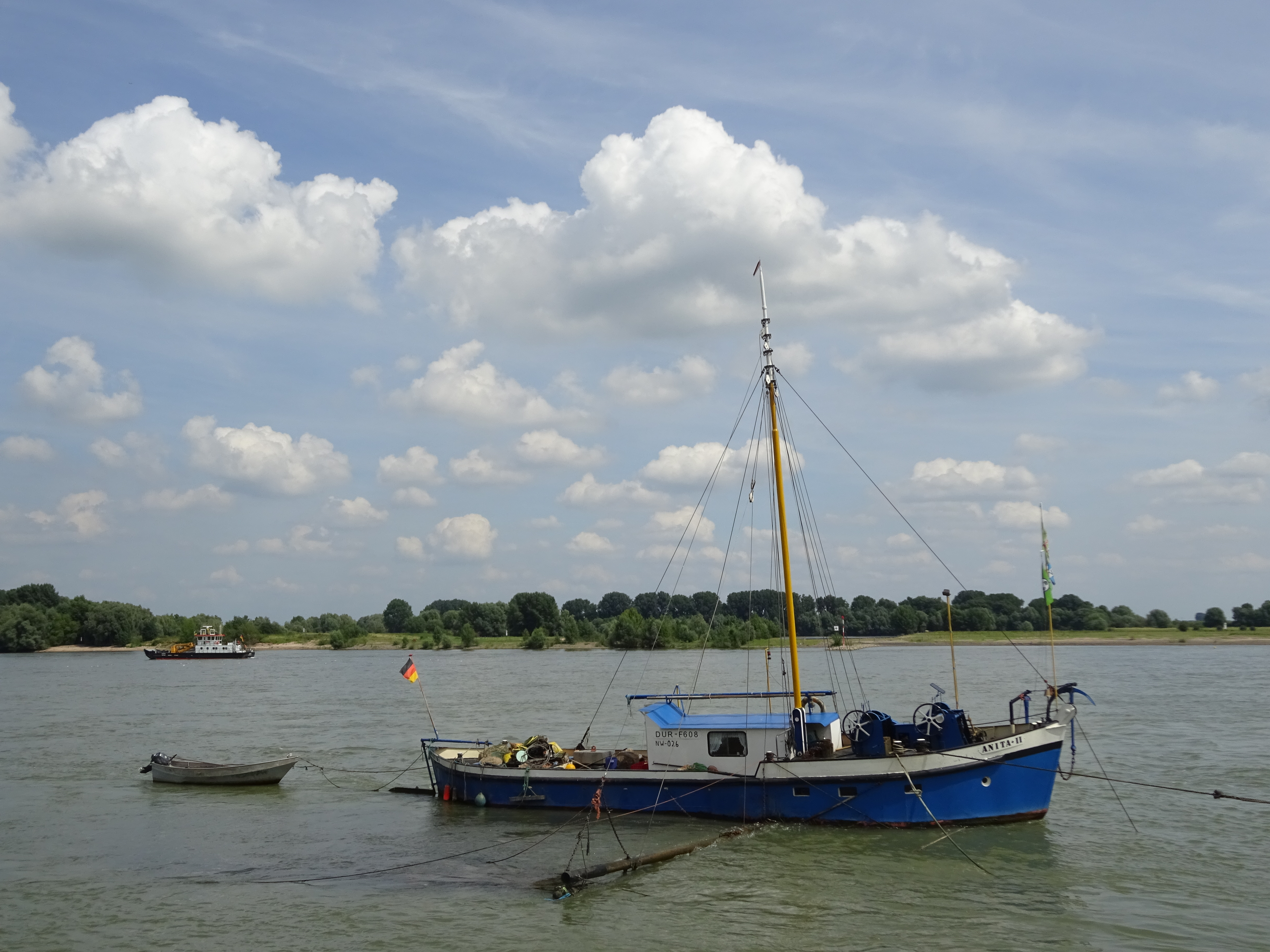 Rijnvisserij, Anita II (1934) in Kalkar-Grieth